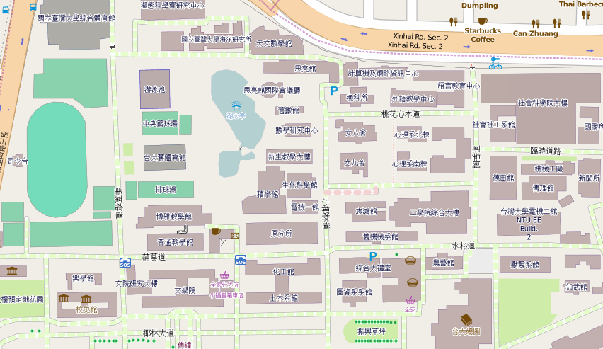 OpenStreetMap上的國立臺灣大學醉月湖。